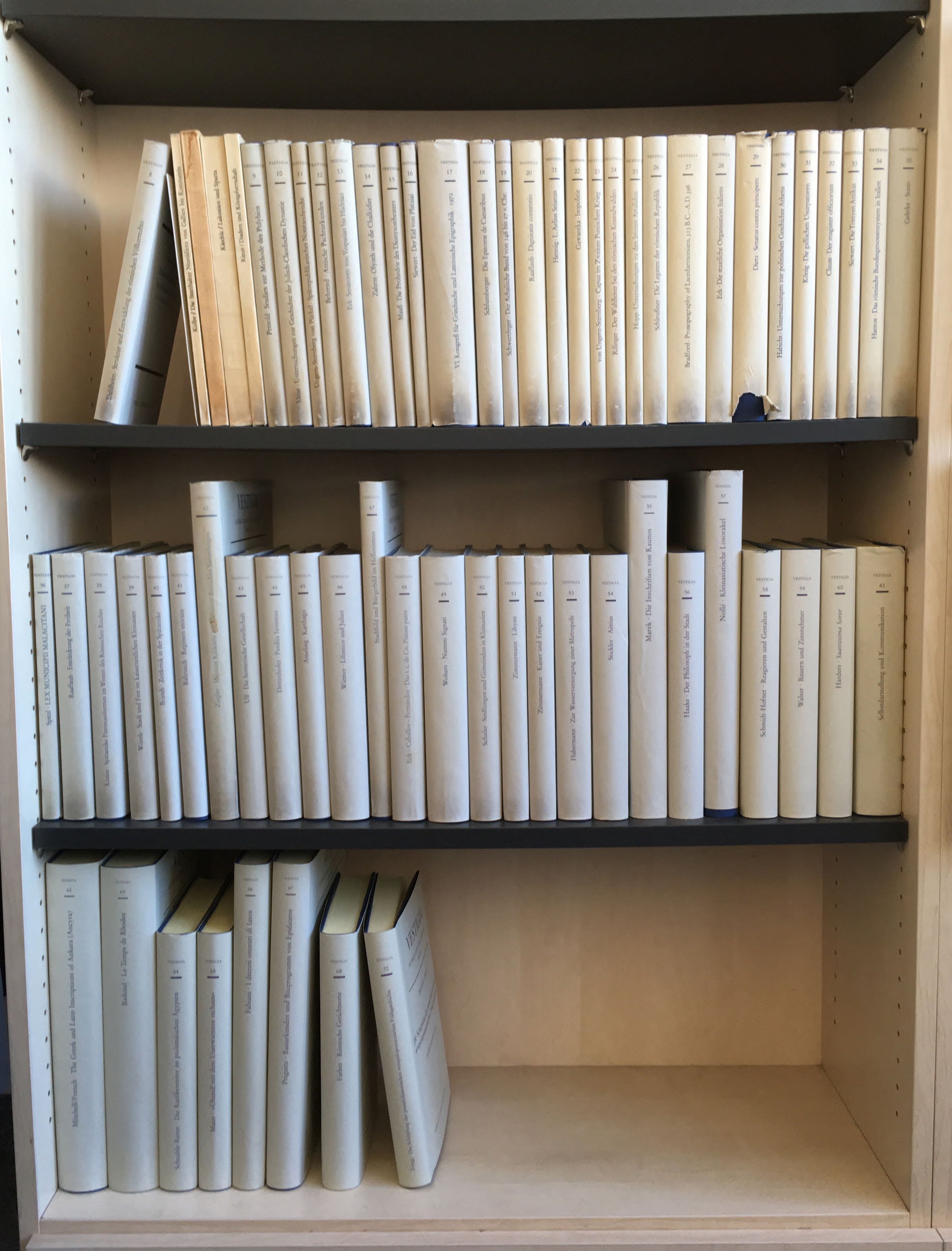 Die bisher erschienenen Bände der Vestigia